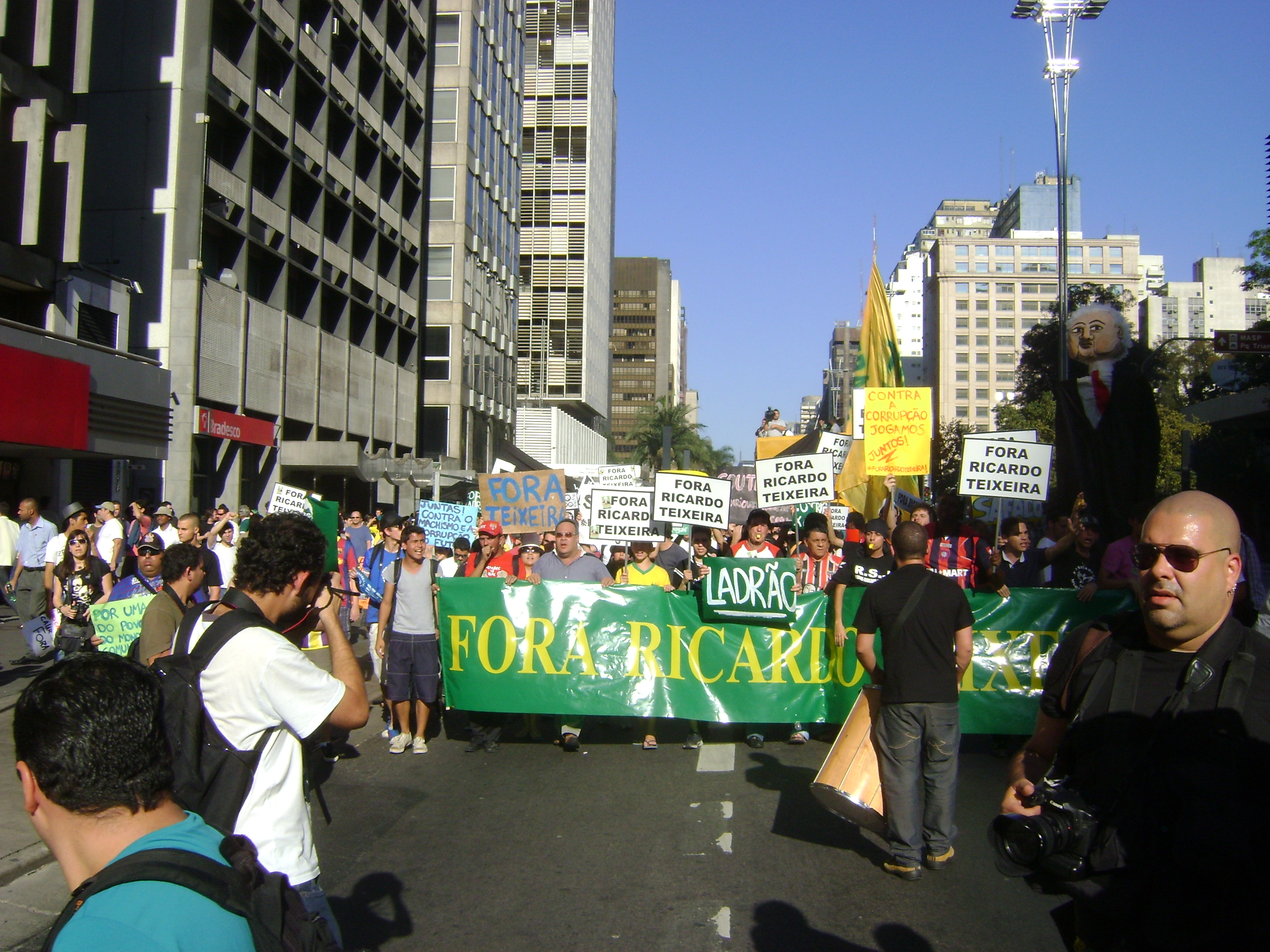 Passeata na Avenida Paulista contra a permanência de Ricardo Teixeira à frente da CBF.